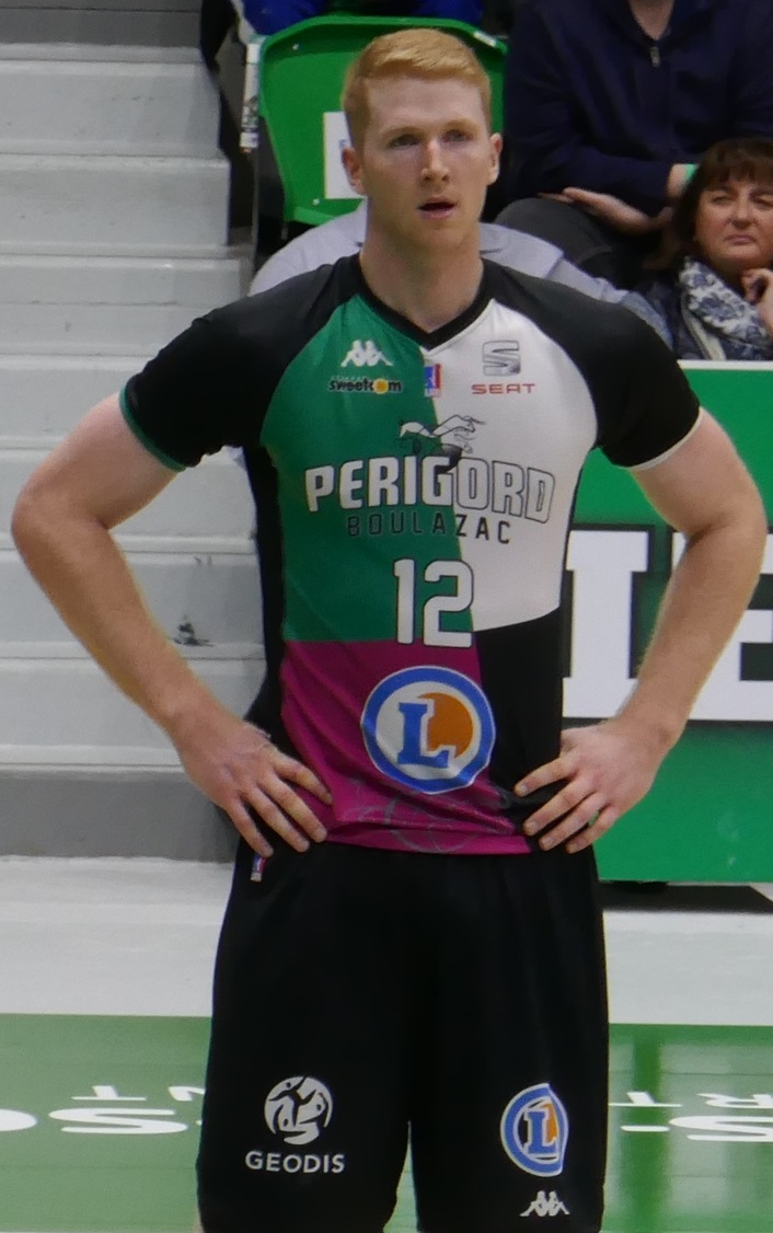 Brandon Ubel avec Boulazac